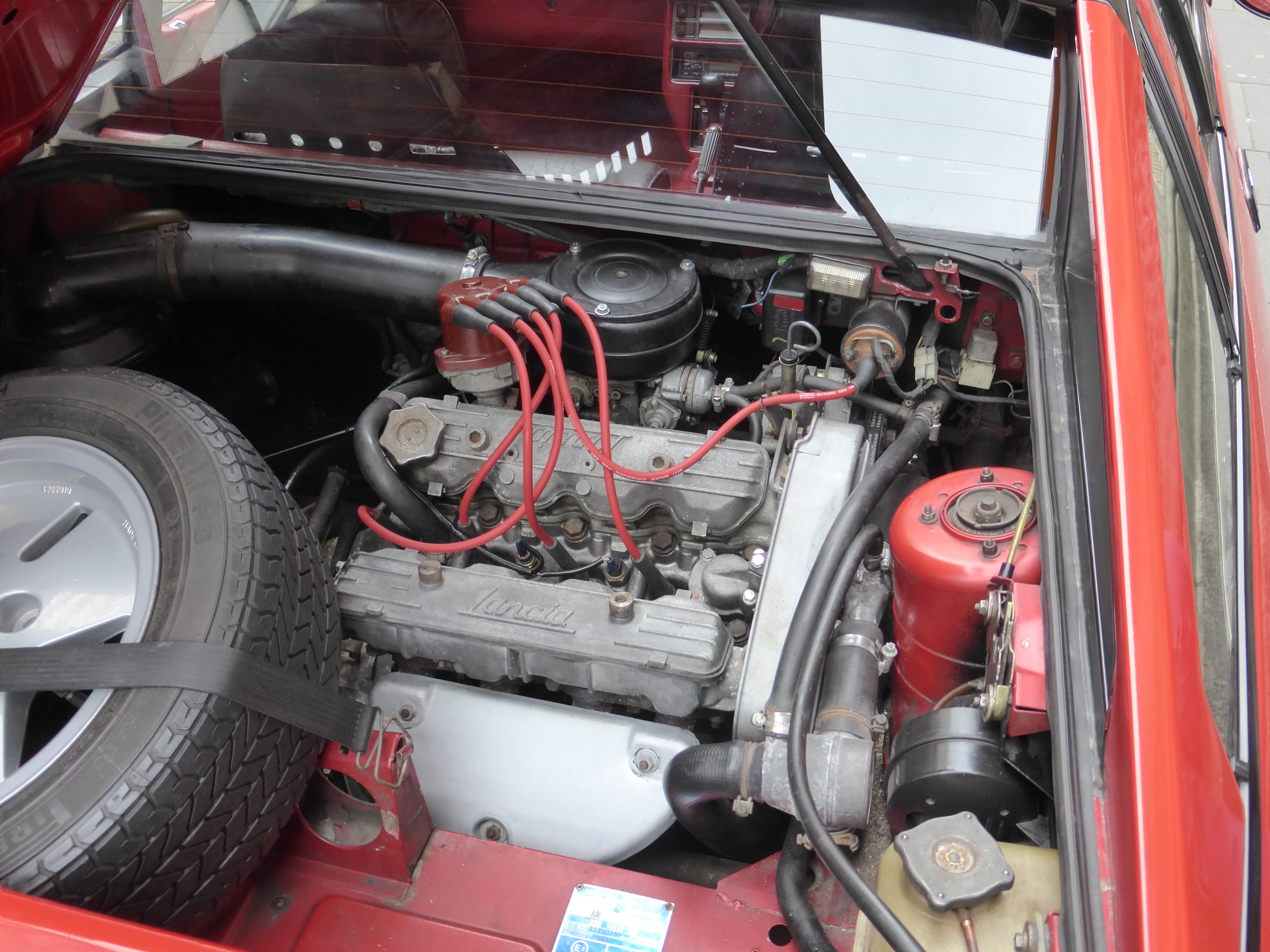 Bristol Italian AutoMoto Festival